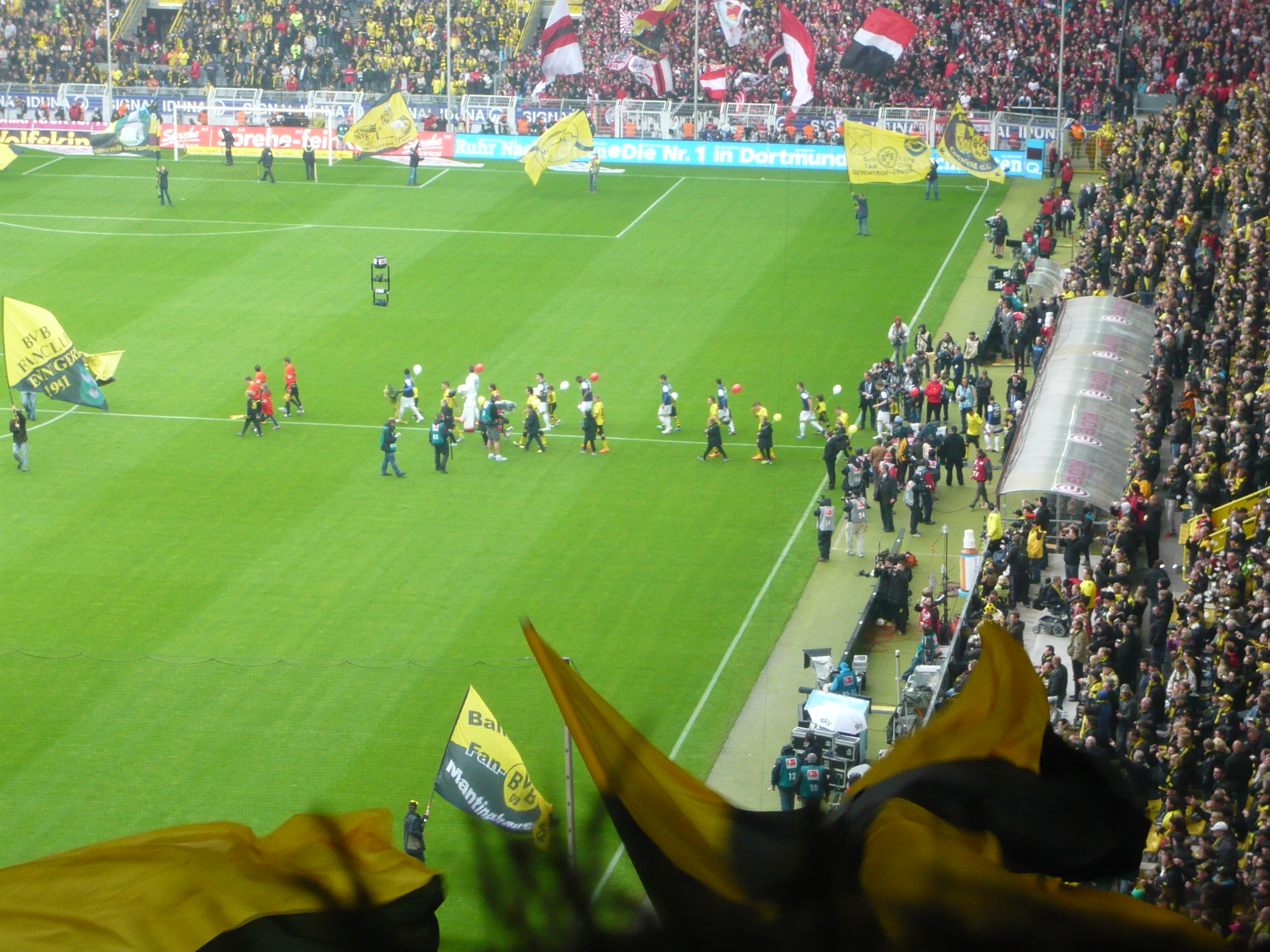 Die Spieler von Borussia Dortmund und dem SC Freiburg beim Einlaufen in den Signal Iduna Park.